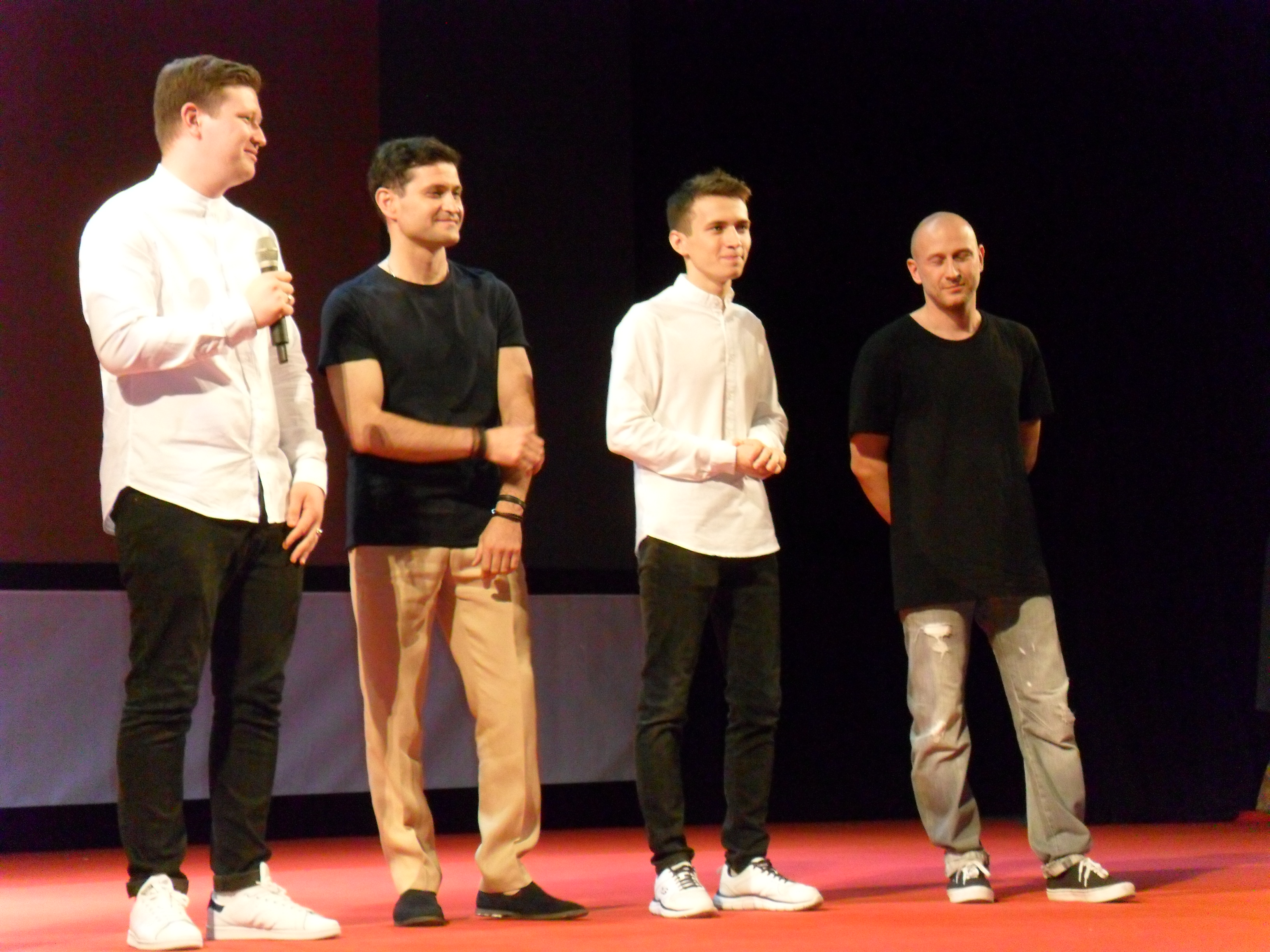 Режисер Наріман Алієв, актори Ахтем Сеітаблаєв і Ремзі Білялов та продюсер Володимир Яценко під час презентації фільму "Evge" ("Додому") на 10-му Одеському міжнародному кінофестивпалі 14.07.2019